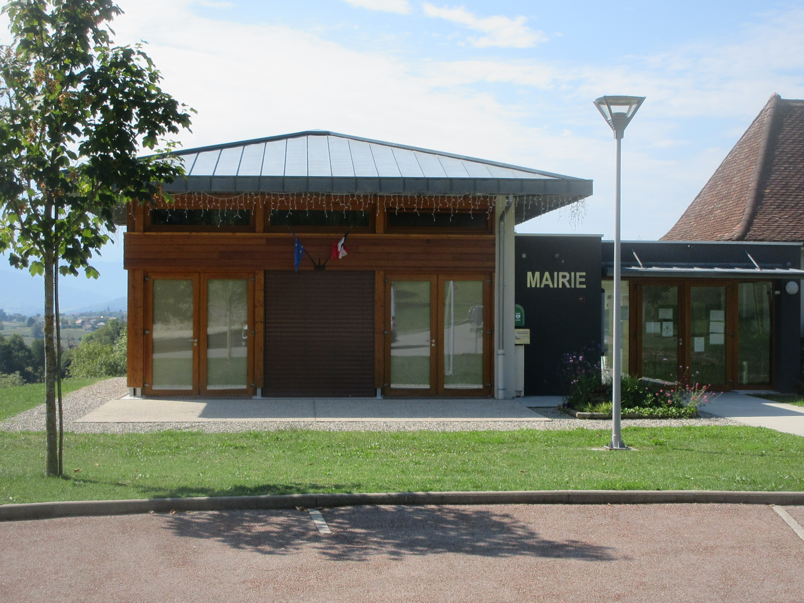 Mairie de Gerbaix.